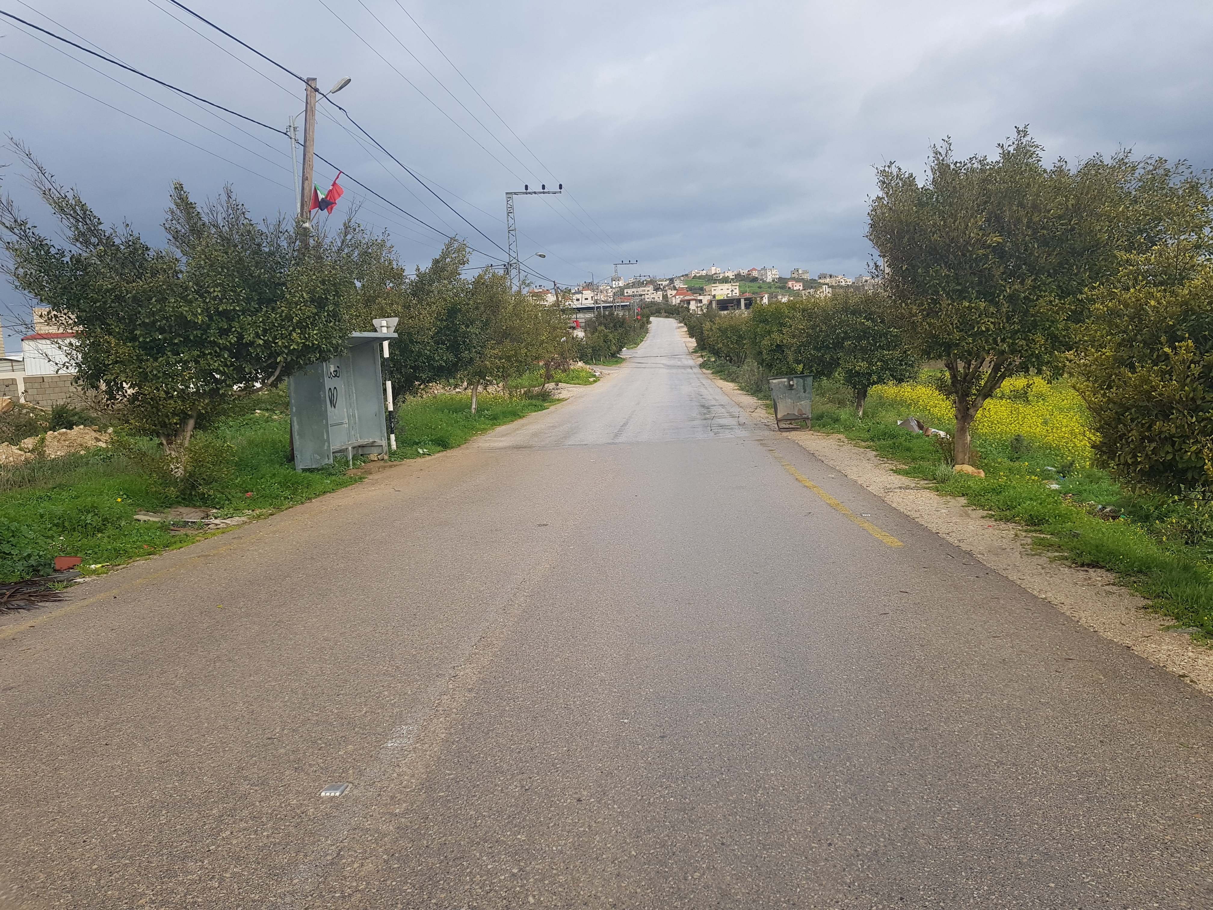 مدخل قرية قوصين الشرقي.